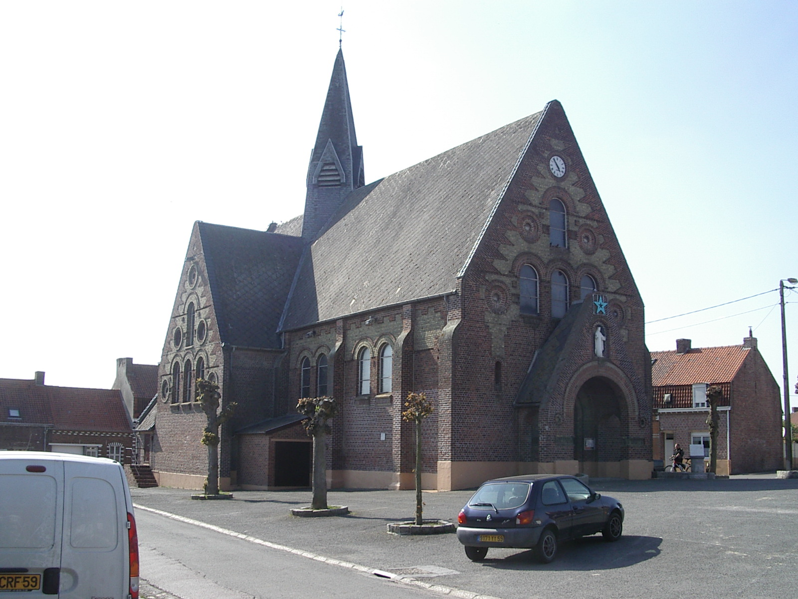 Eglise Saint-Martin de Strazeele (Nord, France)